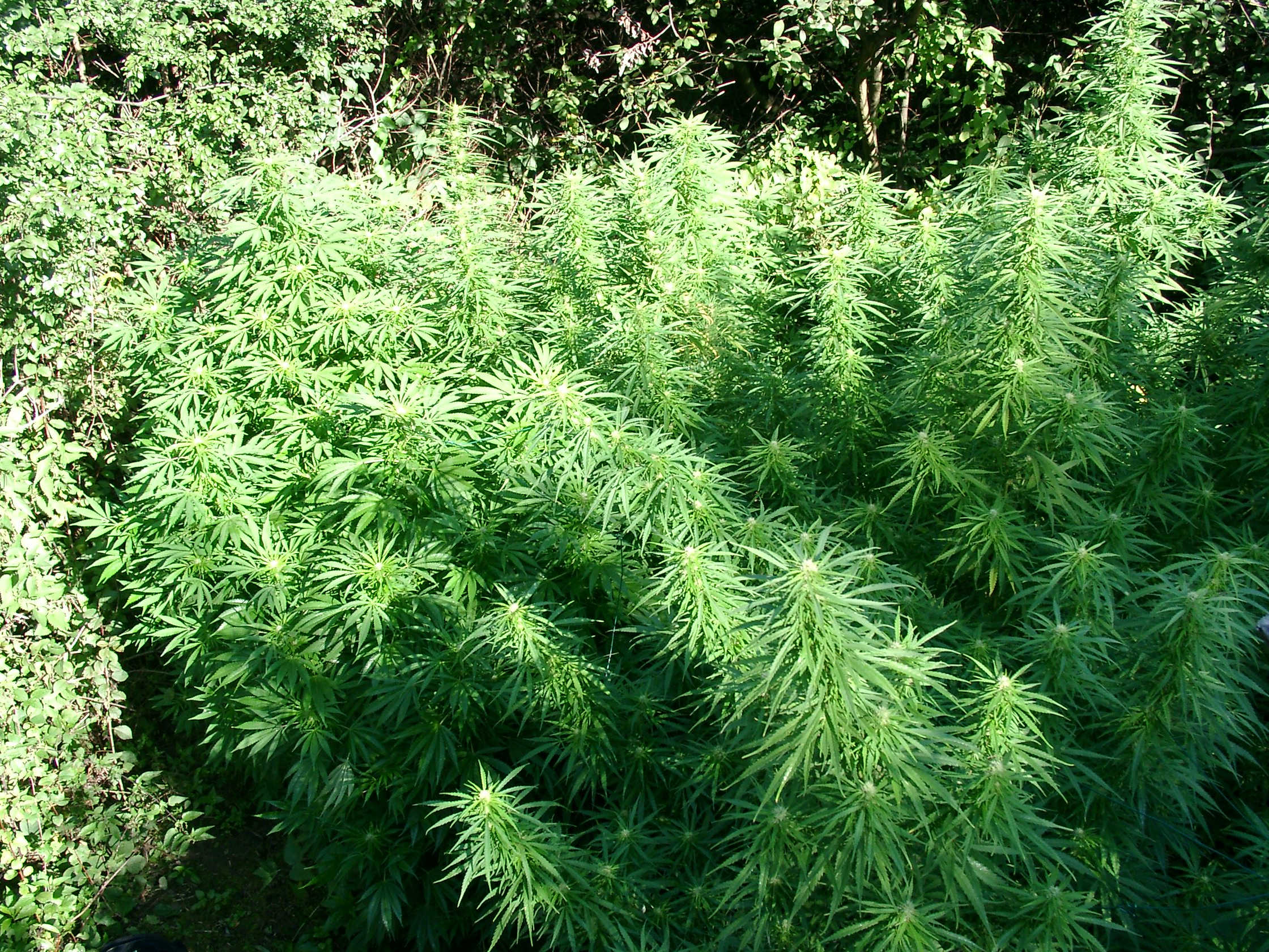 selbst fotografiert auf Jamaika